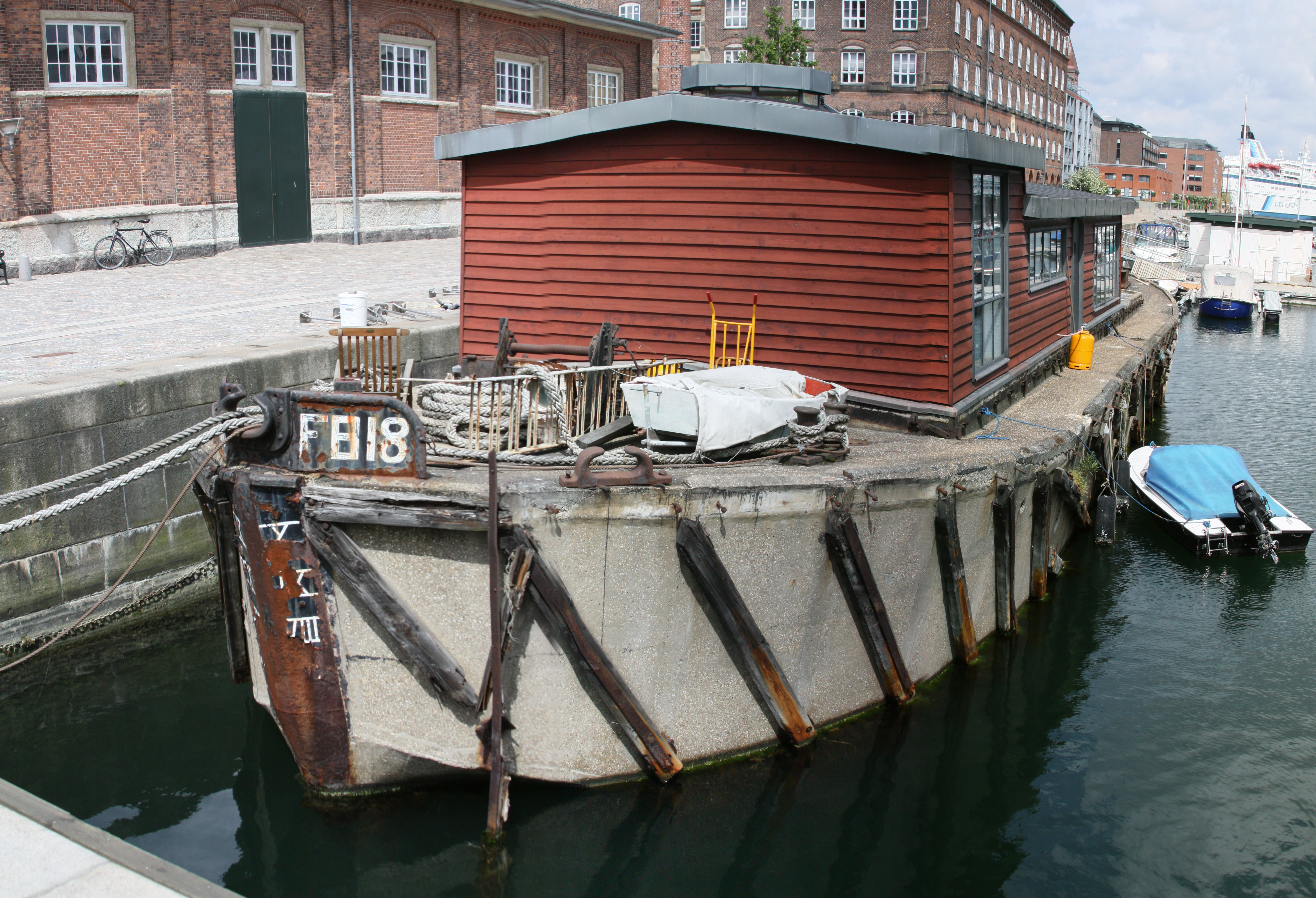 Betonschiff in Kopenhagen 2009